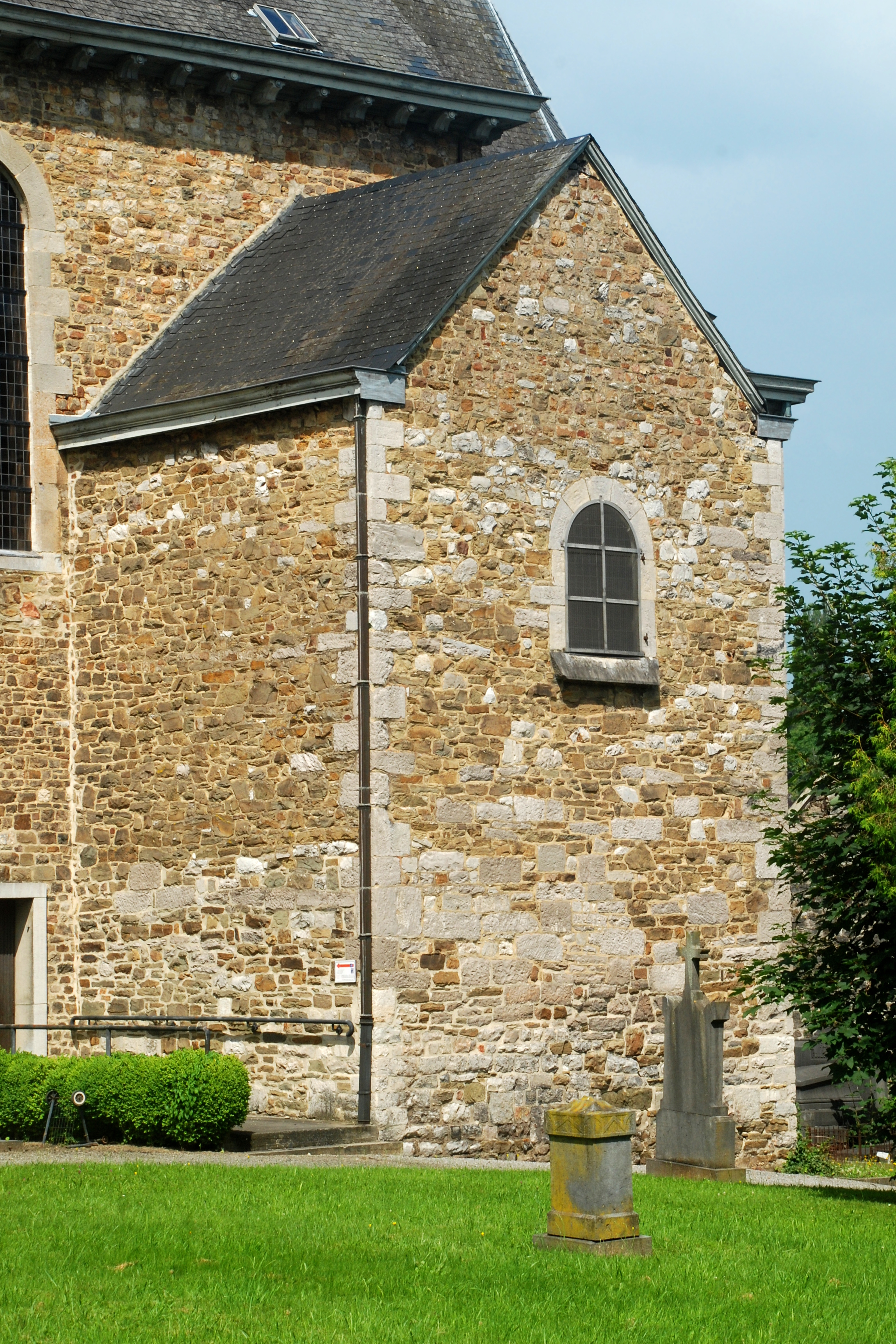 Belgique - Wallonie - Église Saints-Hermès-et-Alexandre de Theux